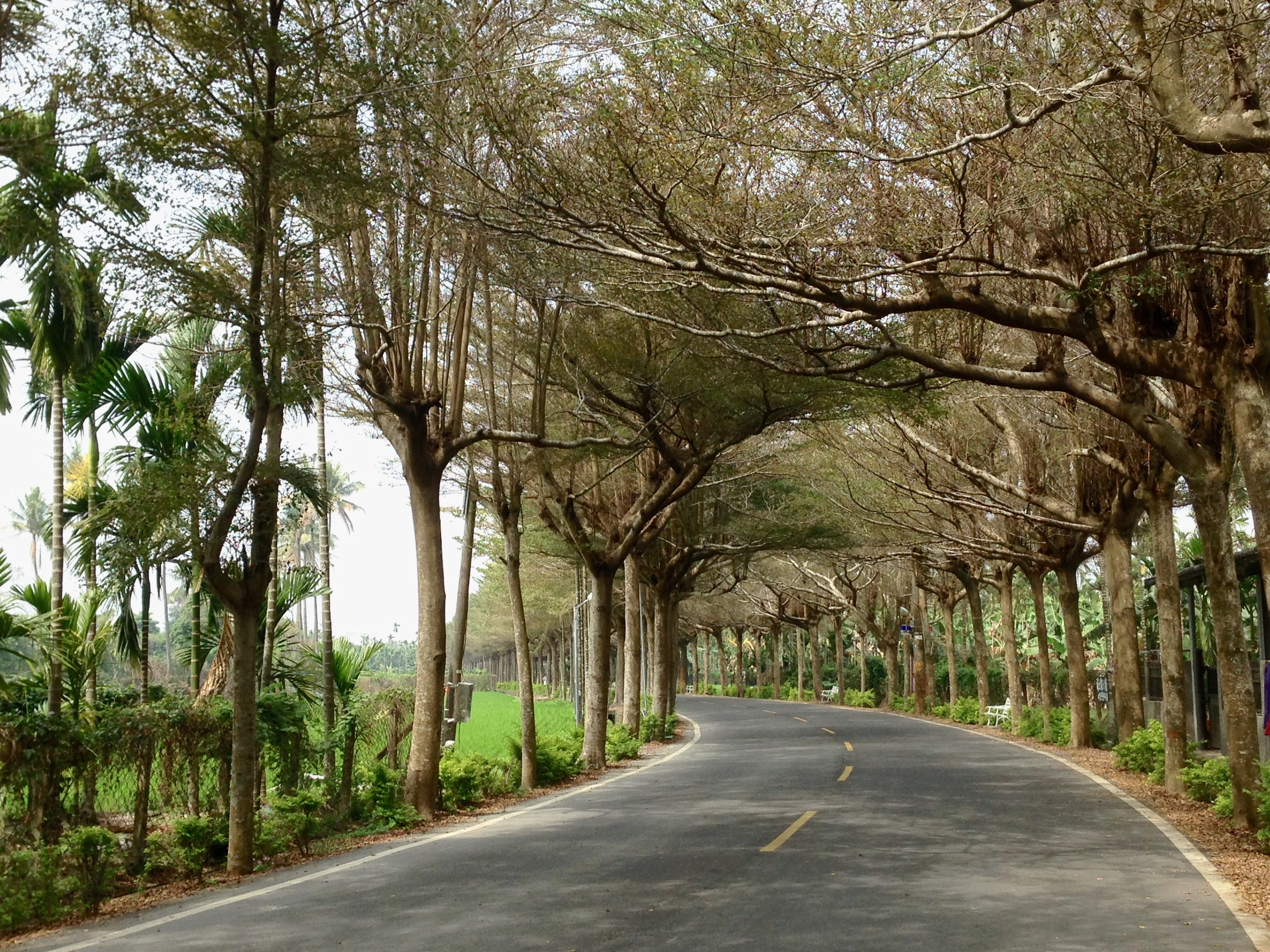 中文（台灣）: 泗林健走步道